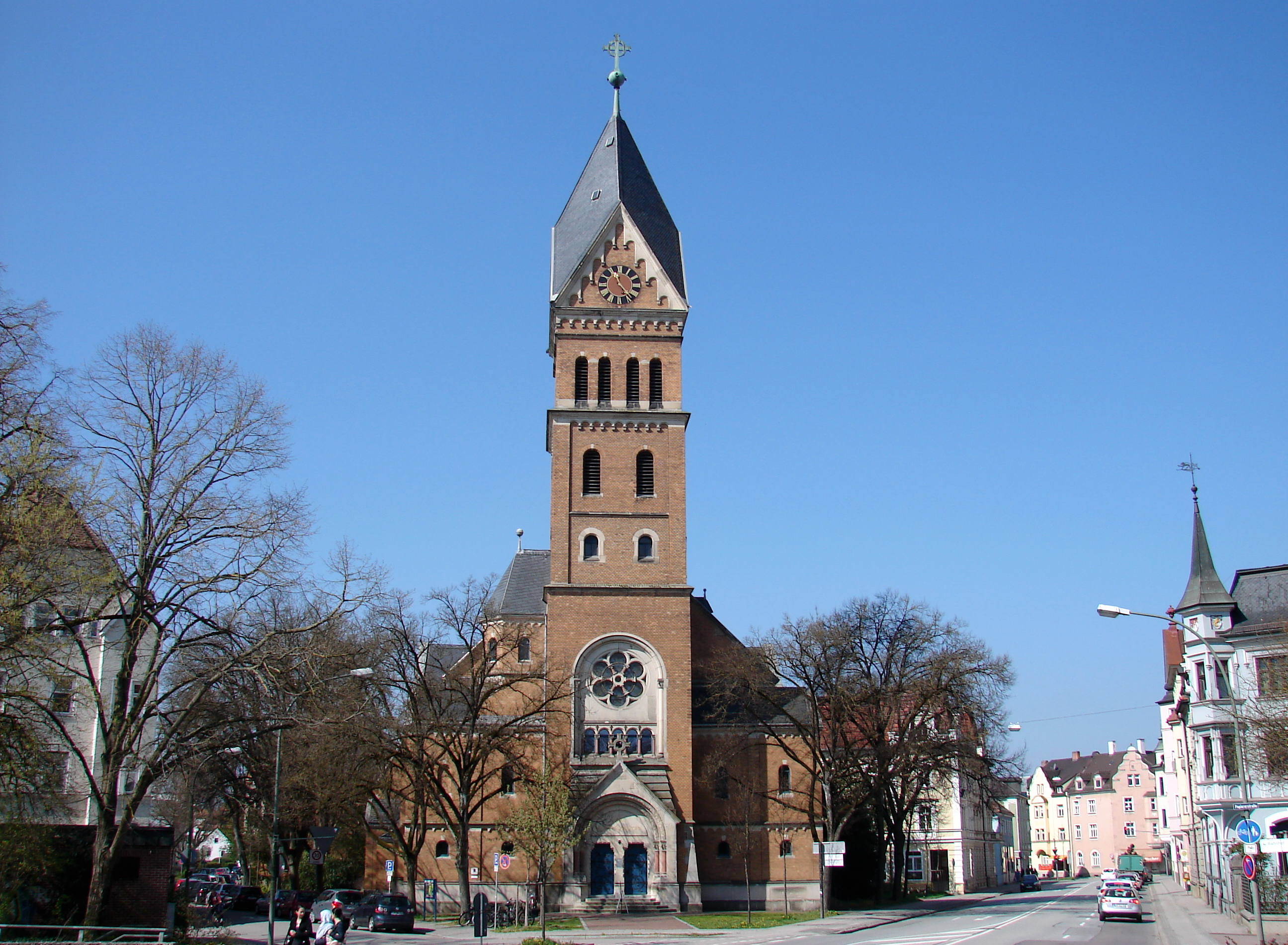 Die Christuskirche an der Luitpoldbrücke ist die älteste noch bestehende evangelisch-lutherische Kirche Landshuts.